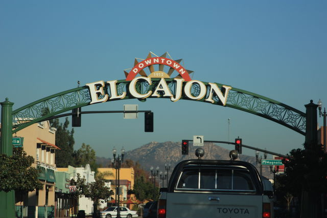 エルカホン